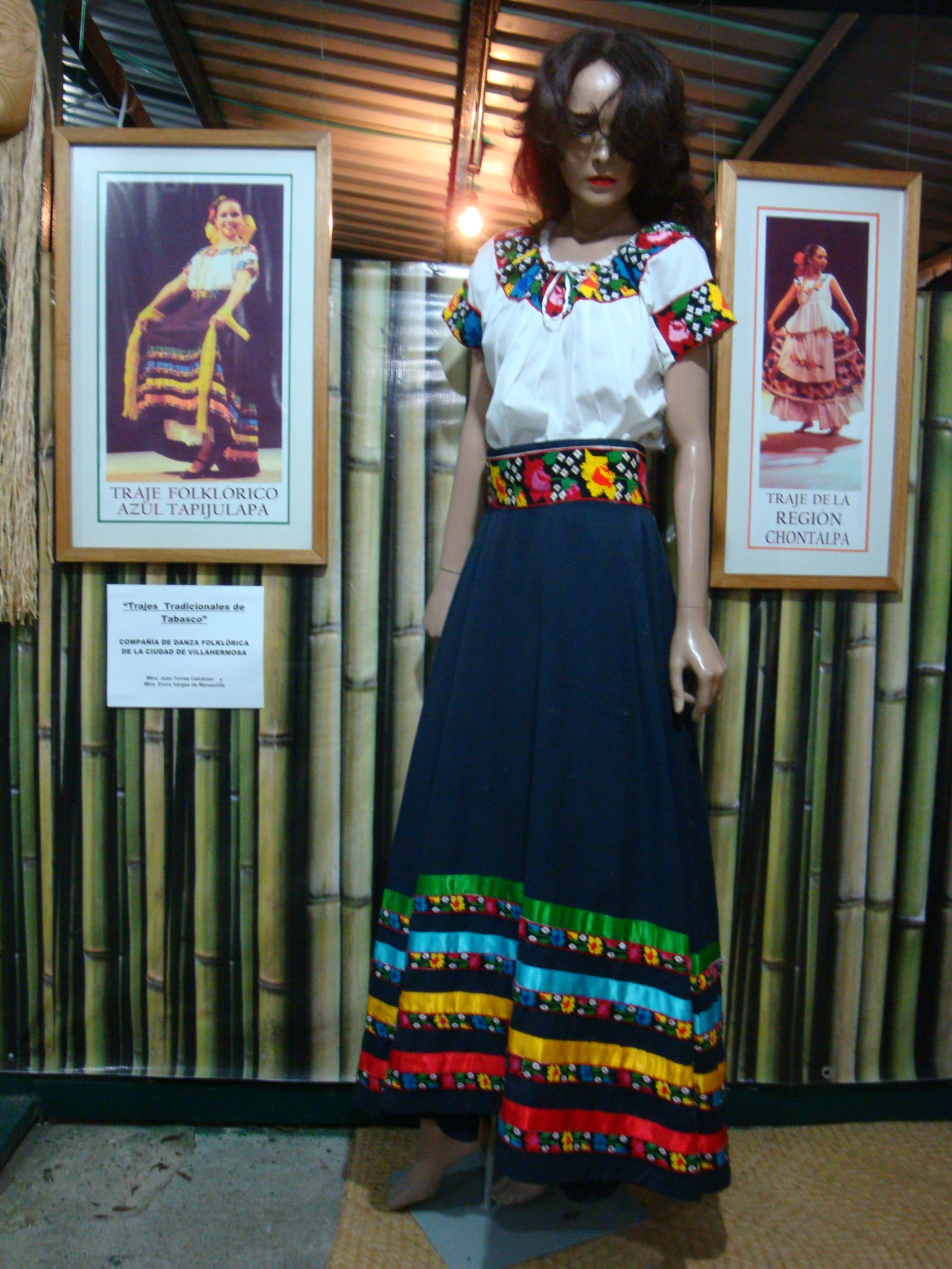 Traje regional de "media gala", del estado de Tabasco, México.